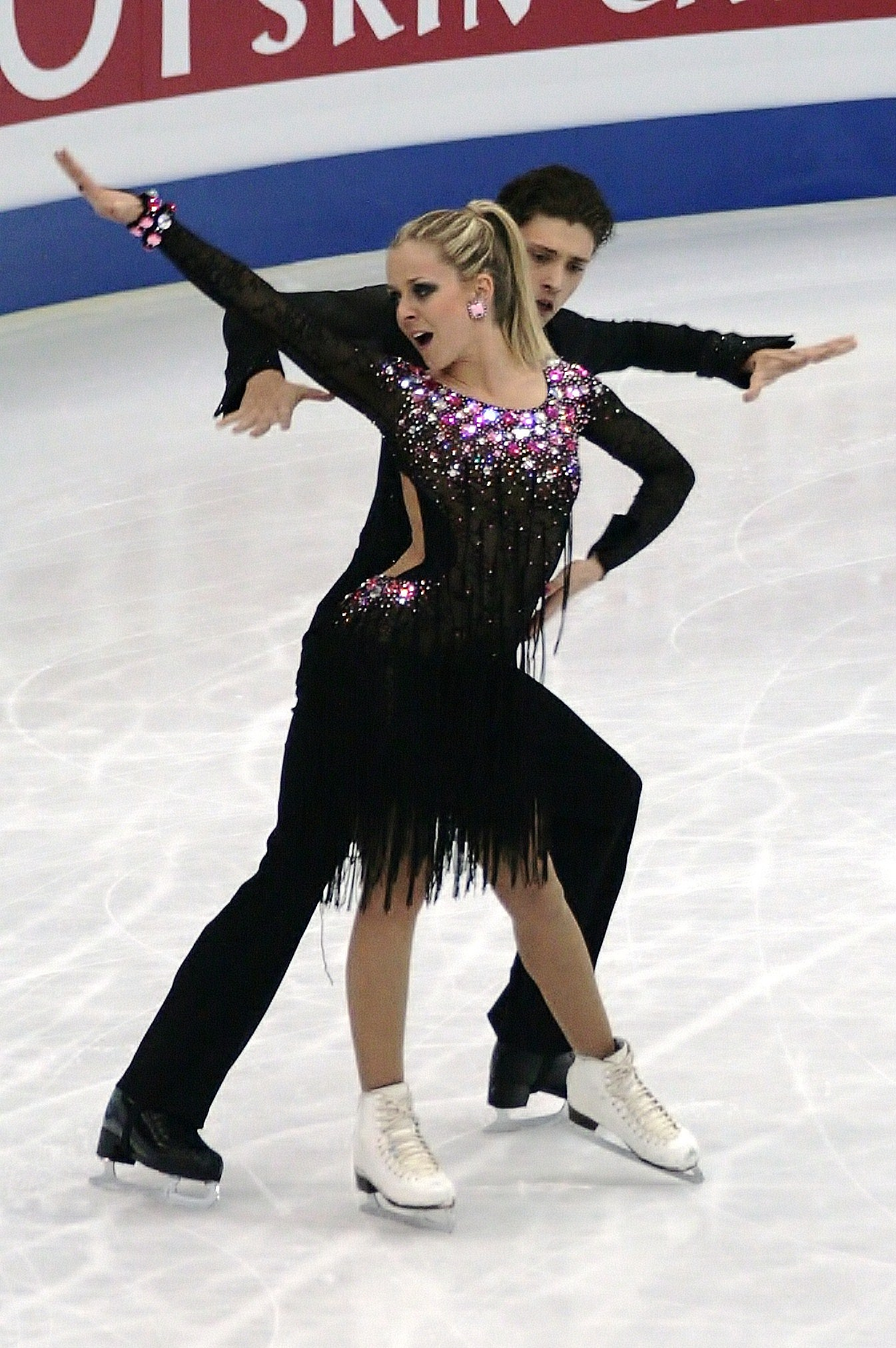 Жужанна Надь и Мате Фееш (Венгрия) на чемпионате мира по фигурному катанию 2012.